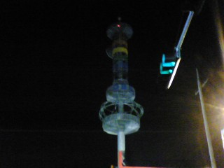 2007년에 제가 직접 찍어서 네이버 카페에 올린 사진입니다.